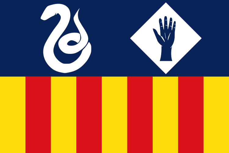 Bandera de Manlleu, inspirada en el serpent, la mà de manlleu i la bandera del principat de Catalunya.